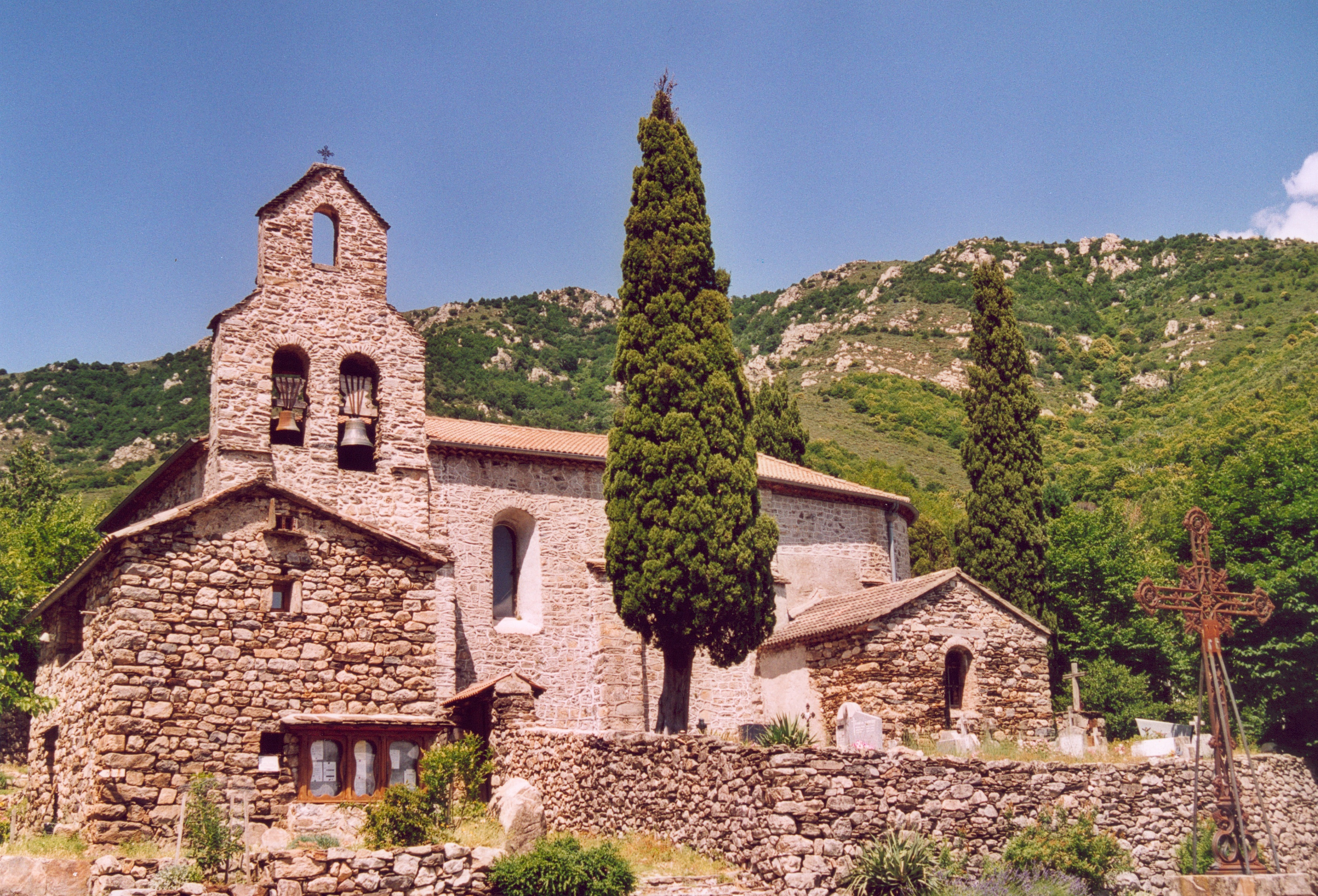 France Ardeche Dompnac Photographie prise par GIRAUD Patrick